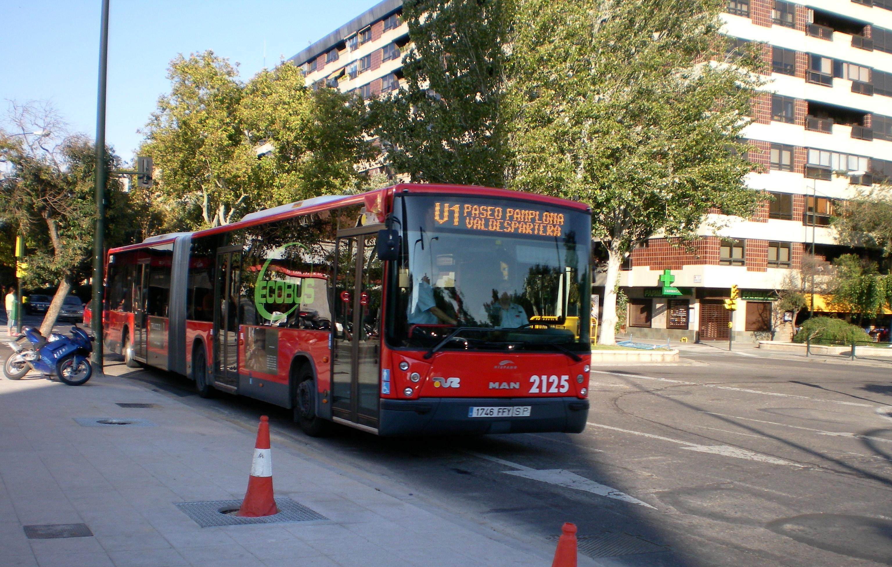 MAN NG313-F perteneciente a TUZSA (Zaragoza, Aragón).